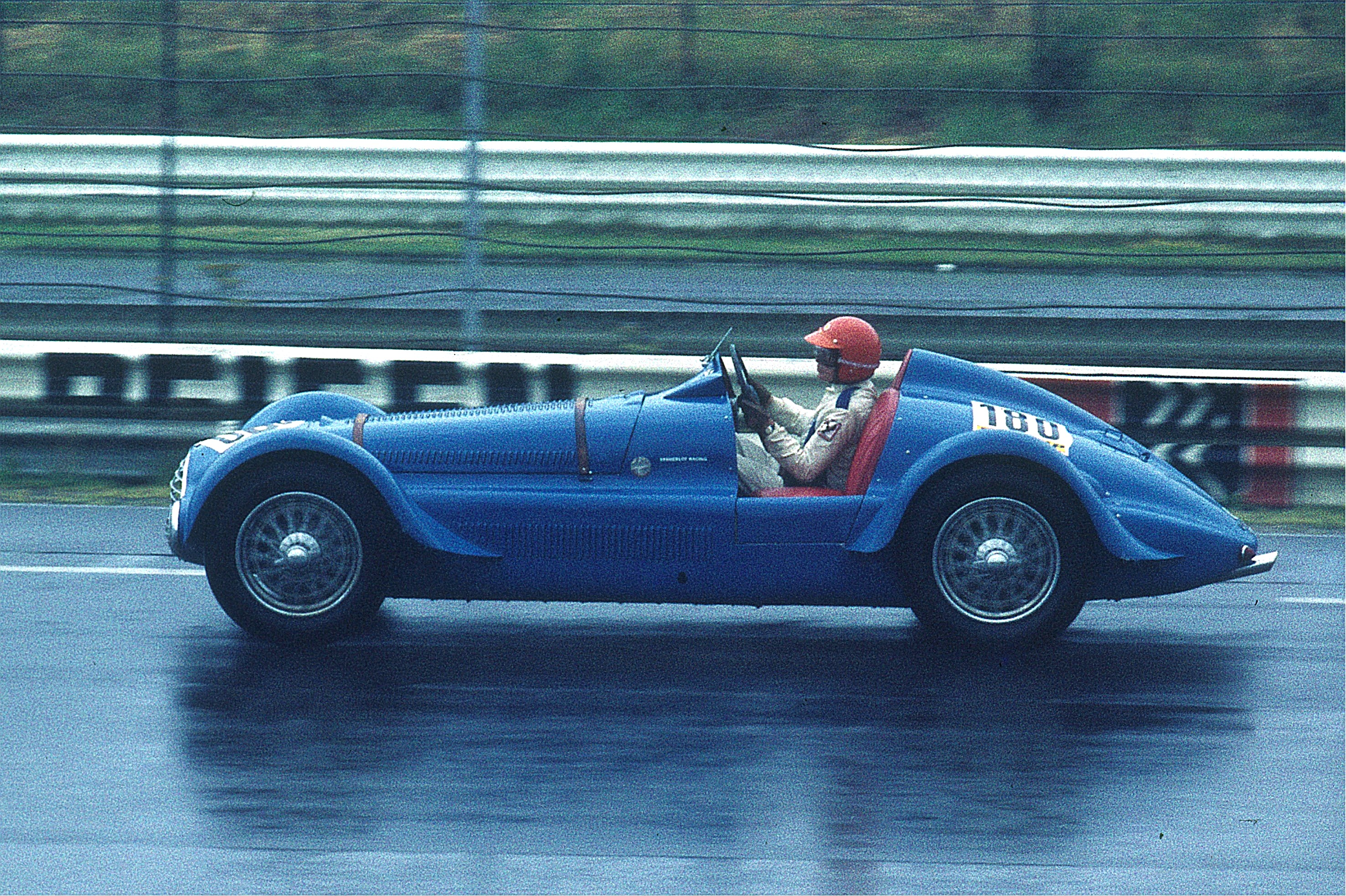 Delahaye 135 MS, Baujahr 1935/36, Fahrer: Dries van der Lof